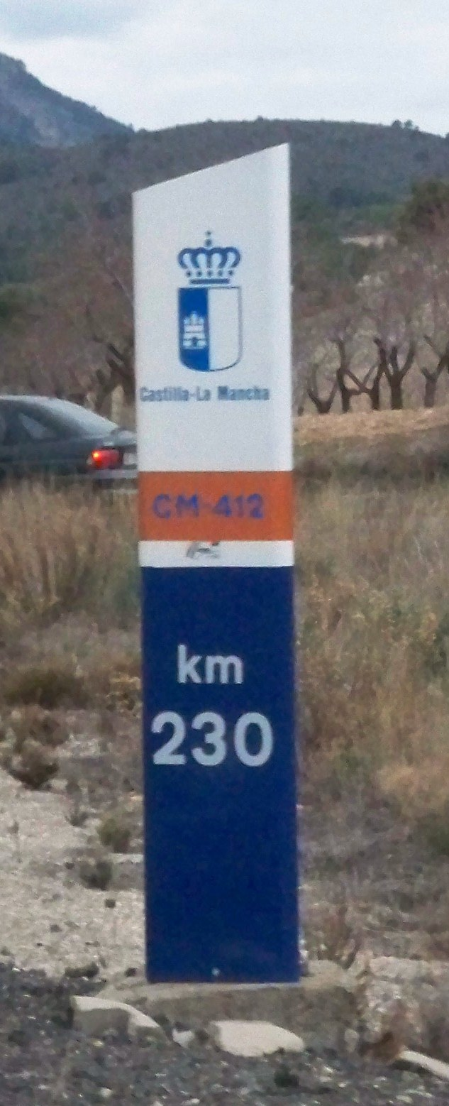 Hito de la carretera autonómica de primer orden CM-420 en Castilla-La Mancha (España)